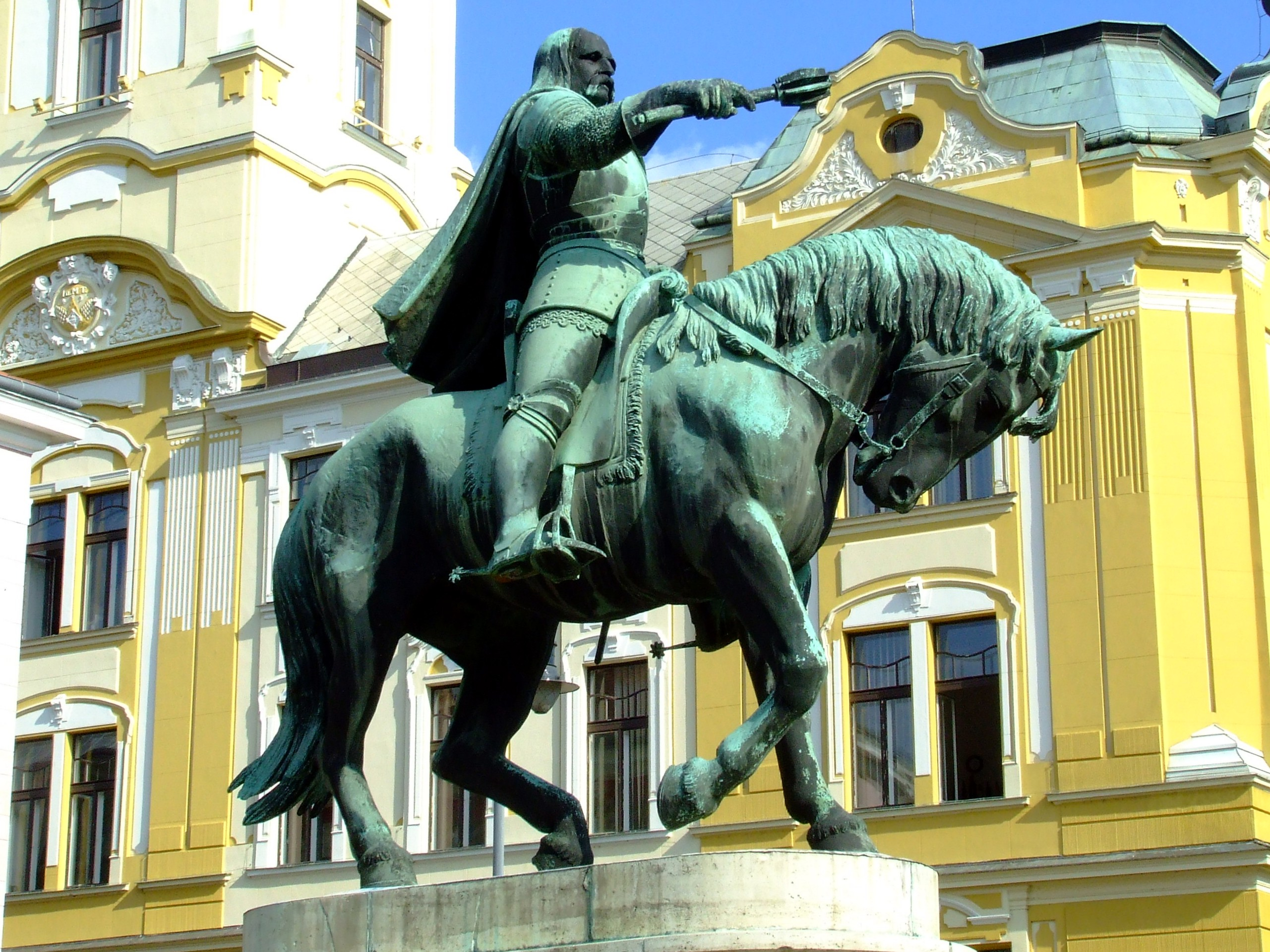 Hunyadi János szobra a pécsi Széchenyi téren. Pátzay Pál alkotása (1956)